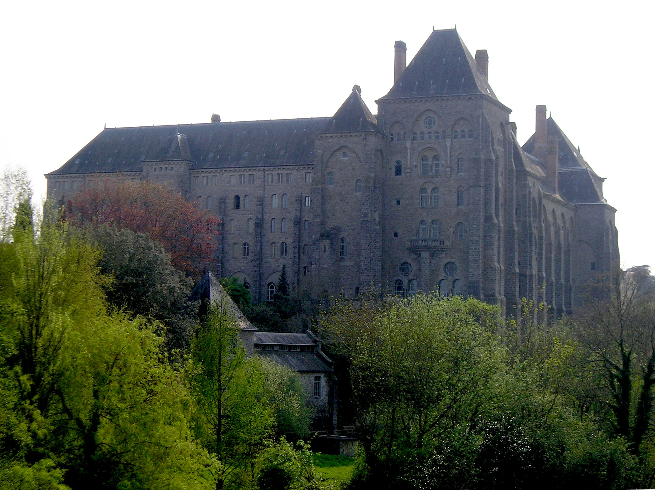 Vue de l'abbaye depuis le pont franchissant la Sarthe.